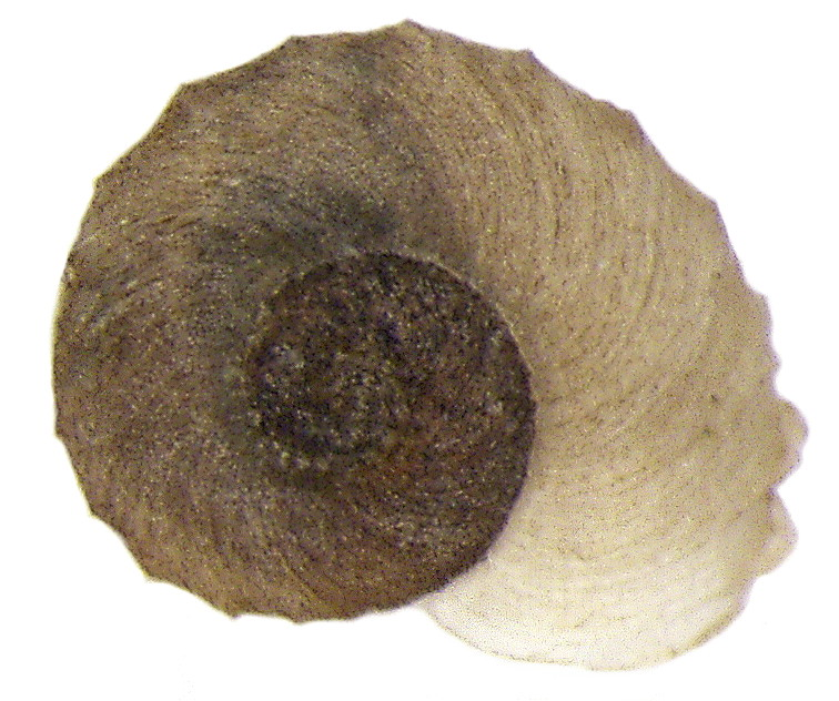 Familie: Planorbidae Grösse: 0,5-2 mm Verbreitung: Europa Ökologie: in pflanzenreichen Gewässern Fundort: Germania, Bayern, Oberfranken, Selbitz leg.det. U.Schmidt, 1988 Foto: U.Schmidt, 2006